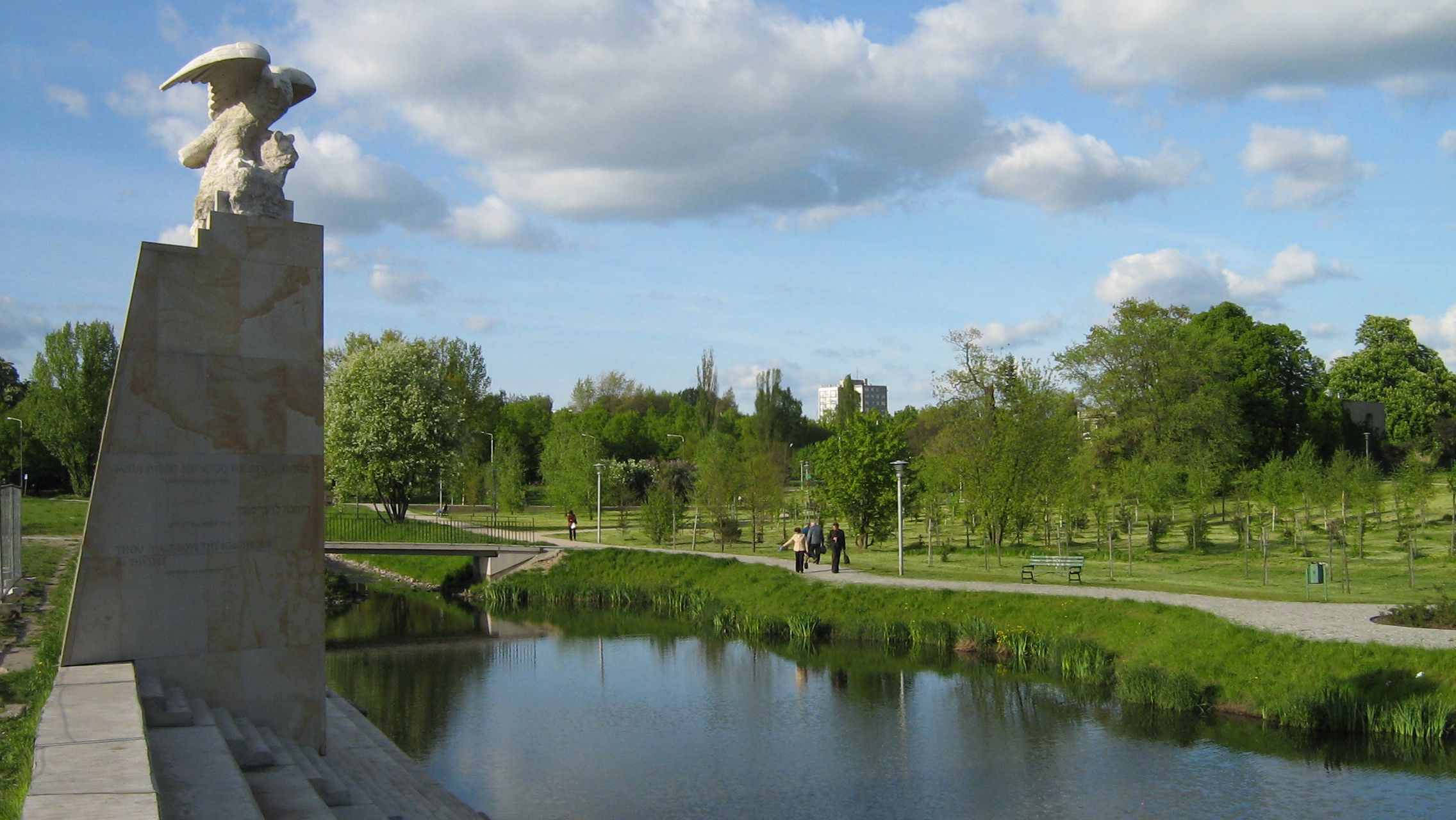 Park Ocalałych w Łodzi - nad stawem na rzece Łódce